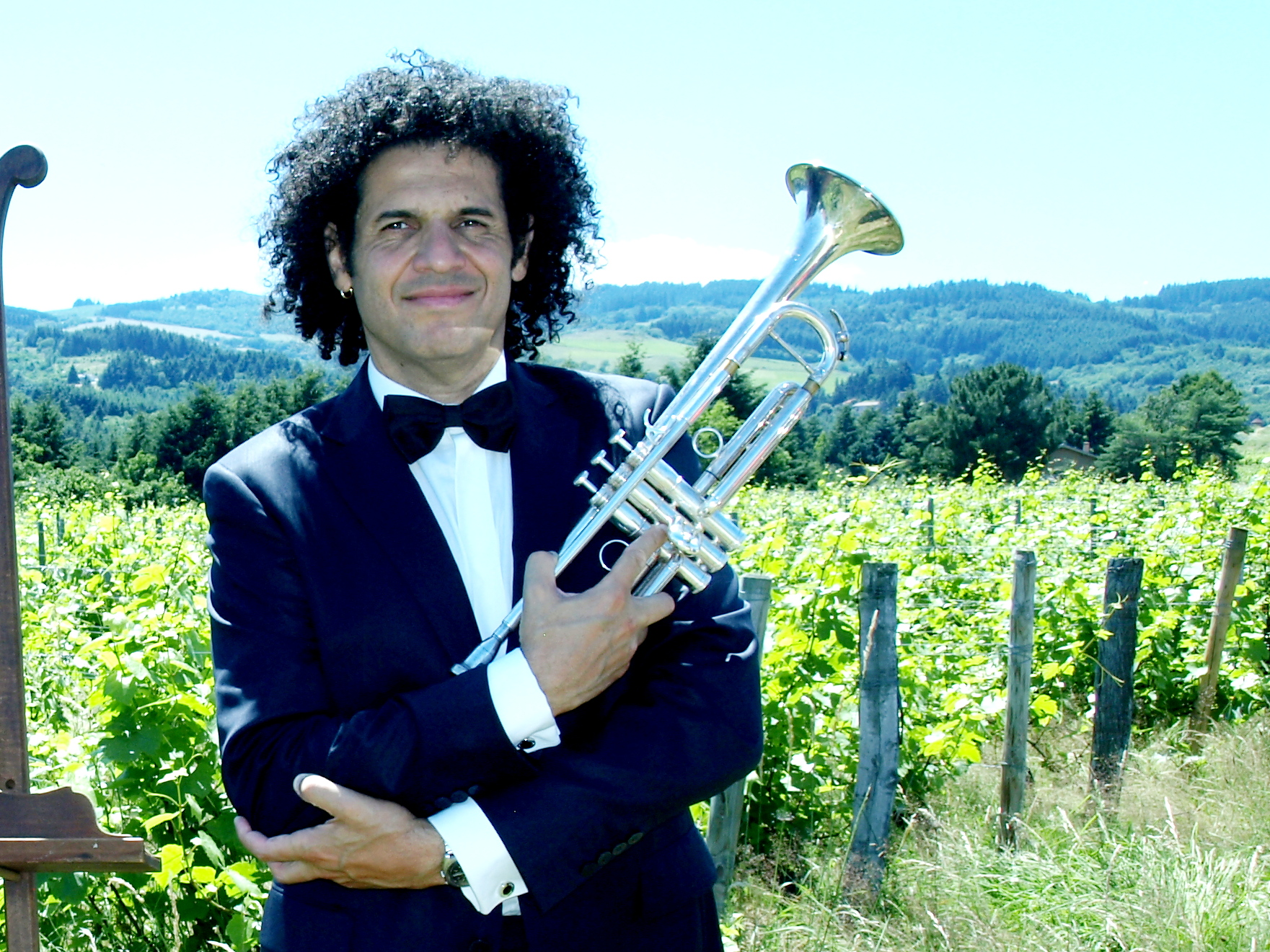 Michel Feugère prépare la prochaine manifestation estivale à Saint Alban les Eaux.